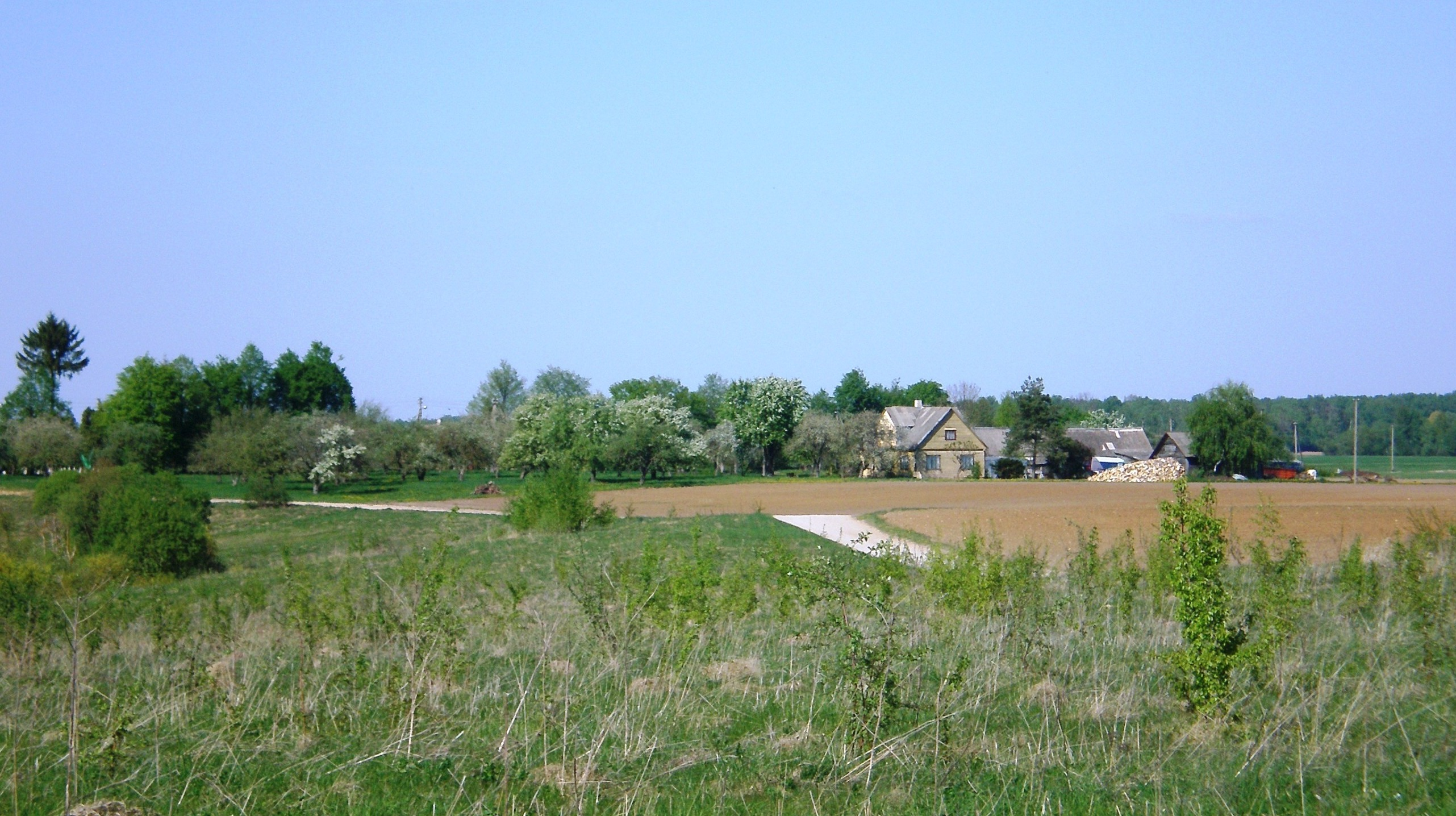 Lioliai, Kėdainių raj.